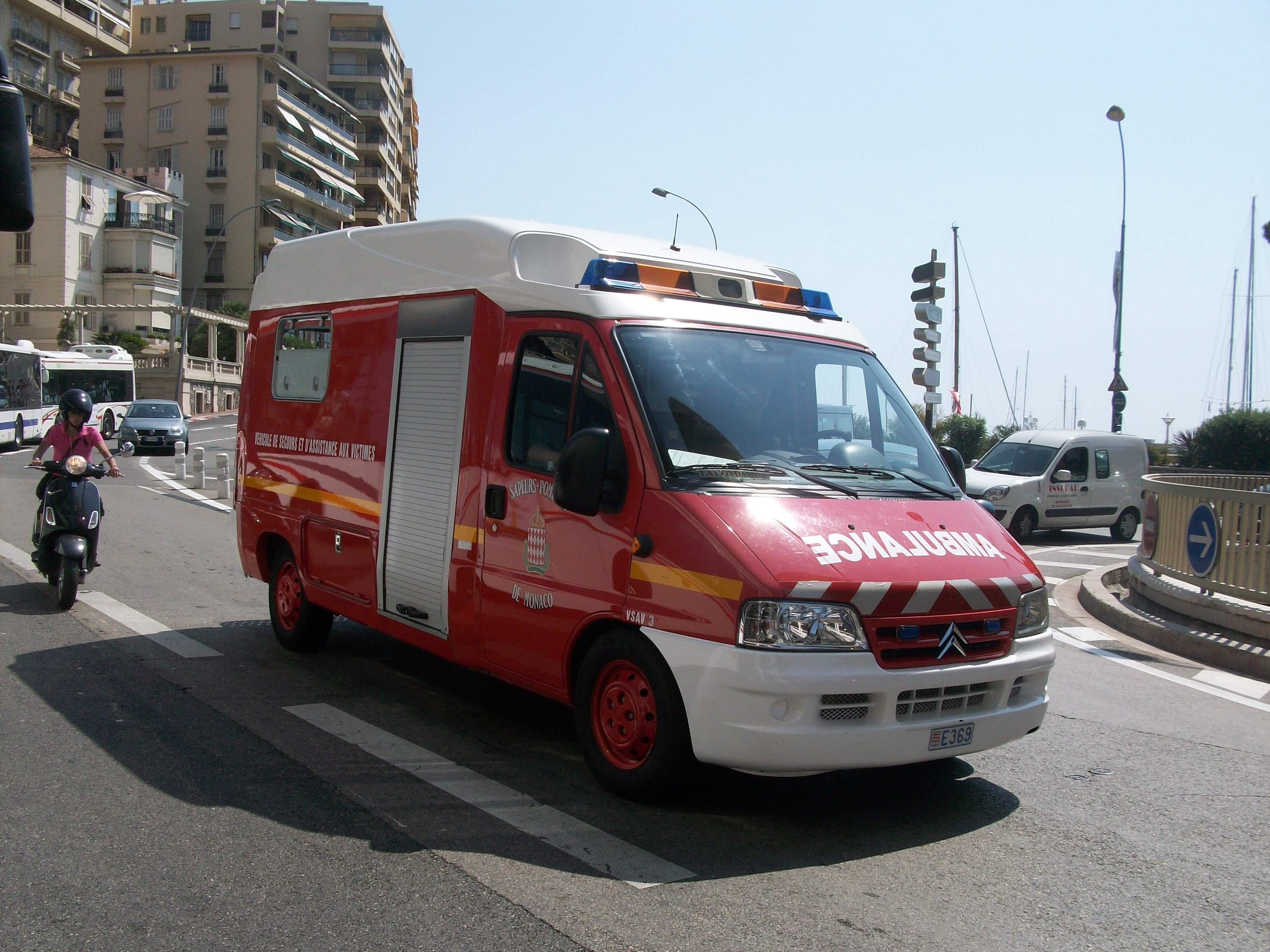 Camion de pompiers à Monaco